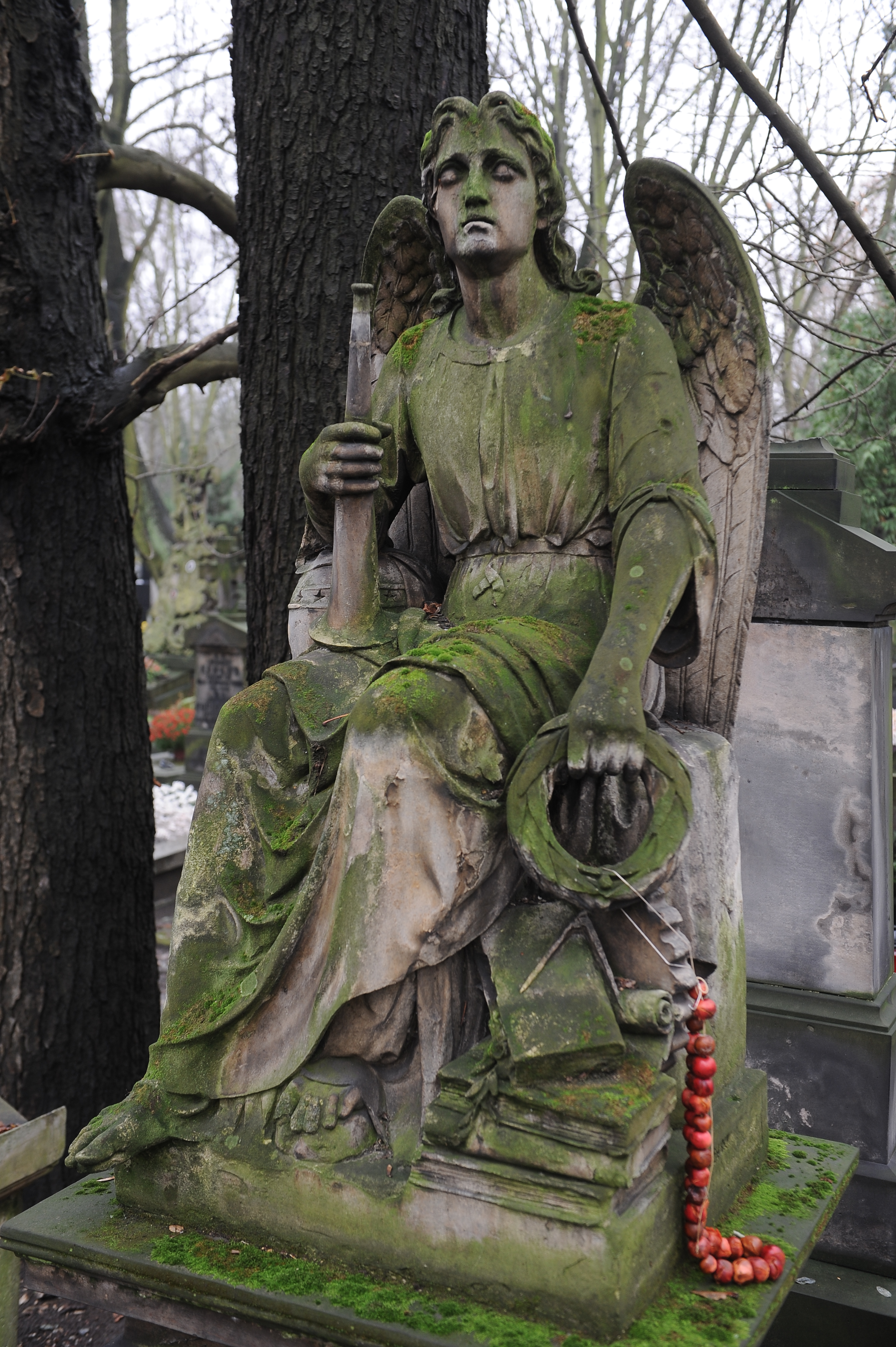 Anioł Zmartwychwstania dłuta Daniela Zaleskiego z 1868 roku na grobie Wacława Łuszczewskiego i Jadwigi Łuszczewskiej "Deotymy" na warszawskich Starych Powązkach (kw. 64, rz. 1)